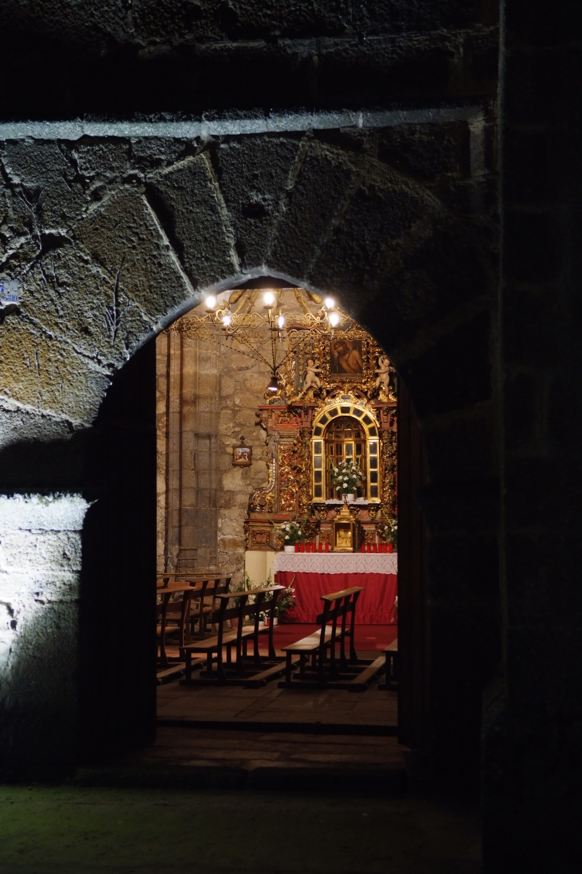 Vista de retablo lateral de la iglesia parroquial de Nuestra Señora de la Asunción en Villafranca de la Sierra (Ávila; España), restaurado en el año 2009